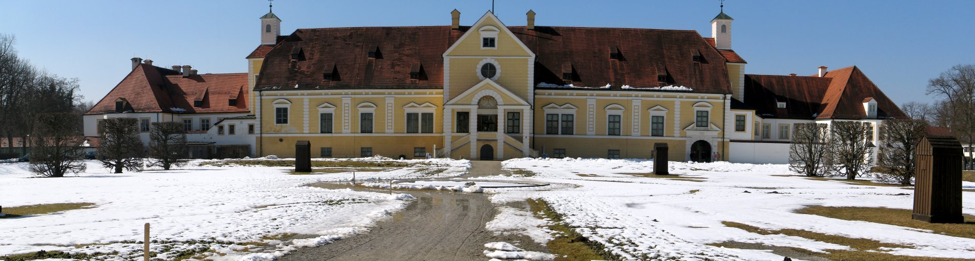 Altes Schloss Schleissheim / Old Castle Schleissheim - panoramic picture Author: Patrick Huebgen Date: March 2006 Camera: Canon Powershot S1